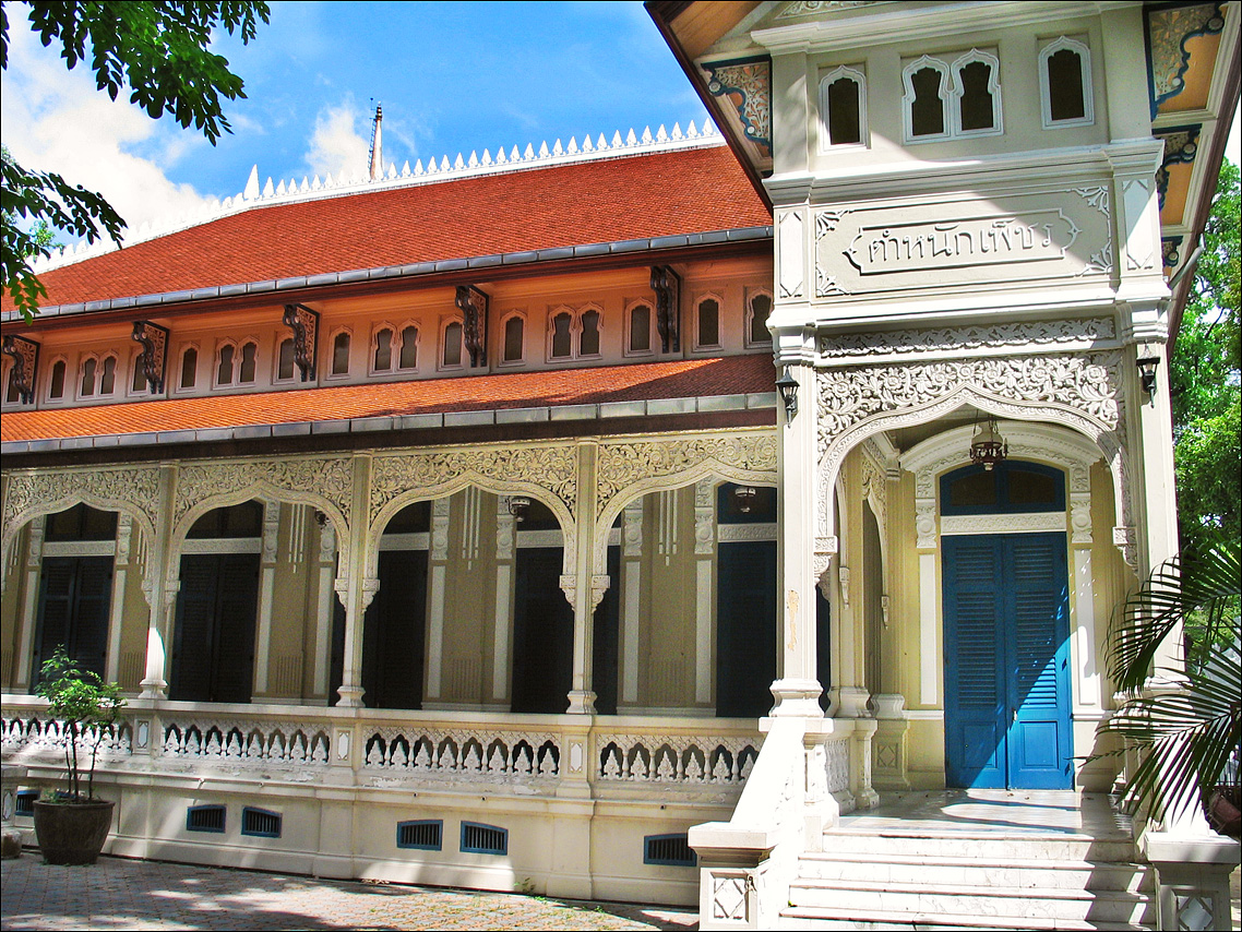 Phra Tamnak Phet (Royal Diamond Residence), Wat Bowonniwet (วัดบวรนิเวศวิหาร), Phra Nakhon, Bangkok.